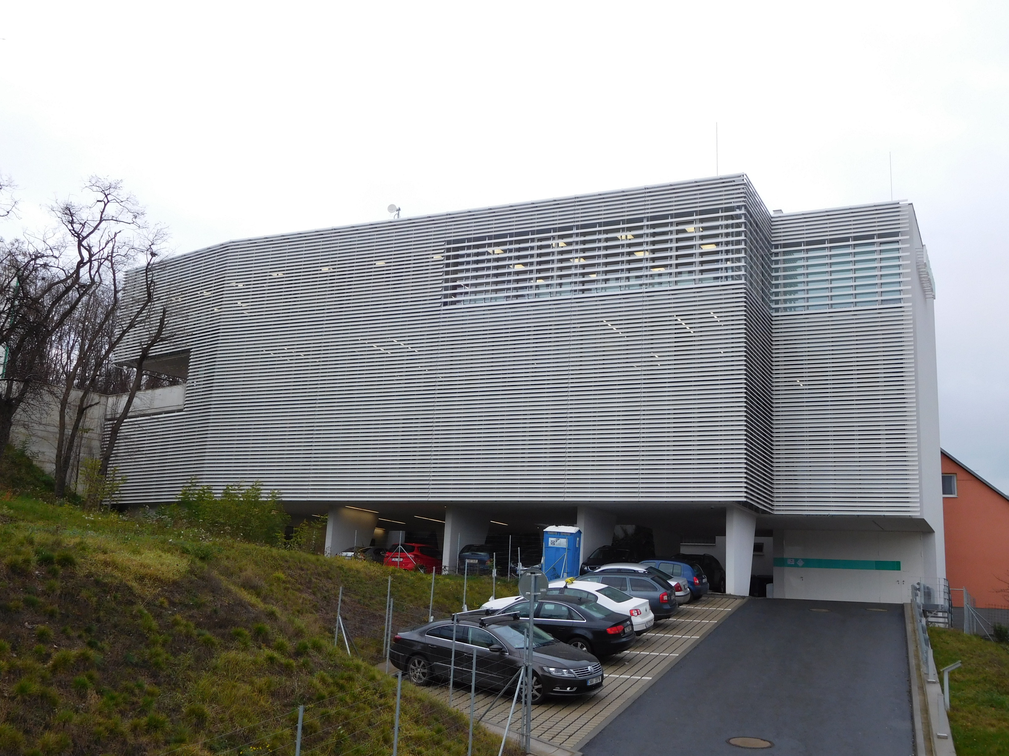 Praha - Libeň - Pavilon B. Braun Dialog